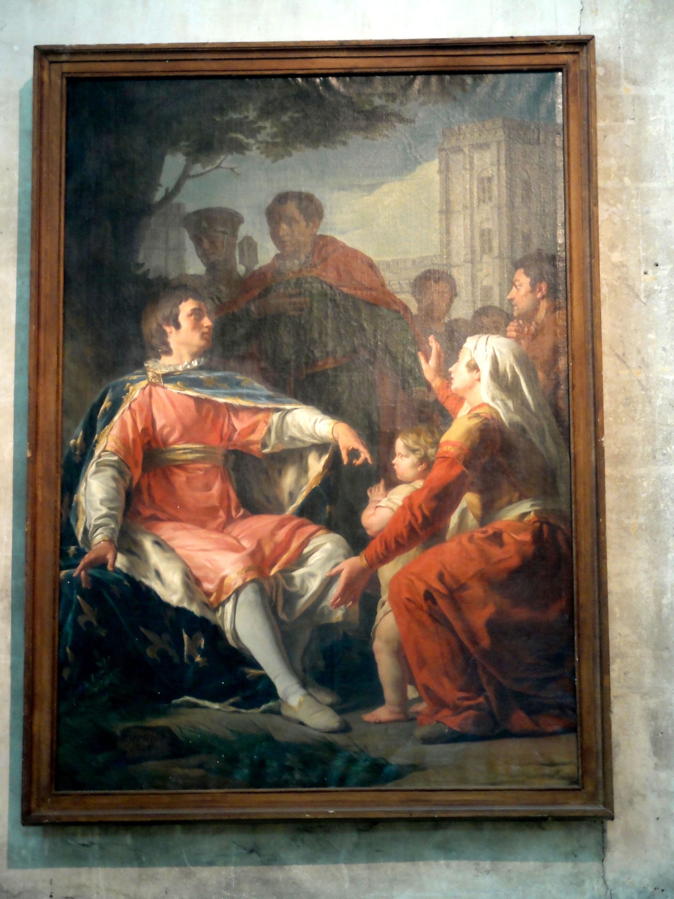 Tableau - Saint Louis rendant la justice à Vincennes, par Nicolas-Guy Brenet.